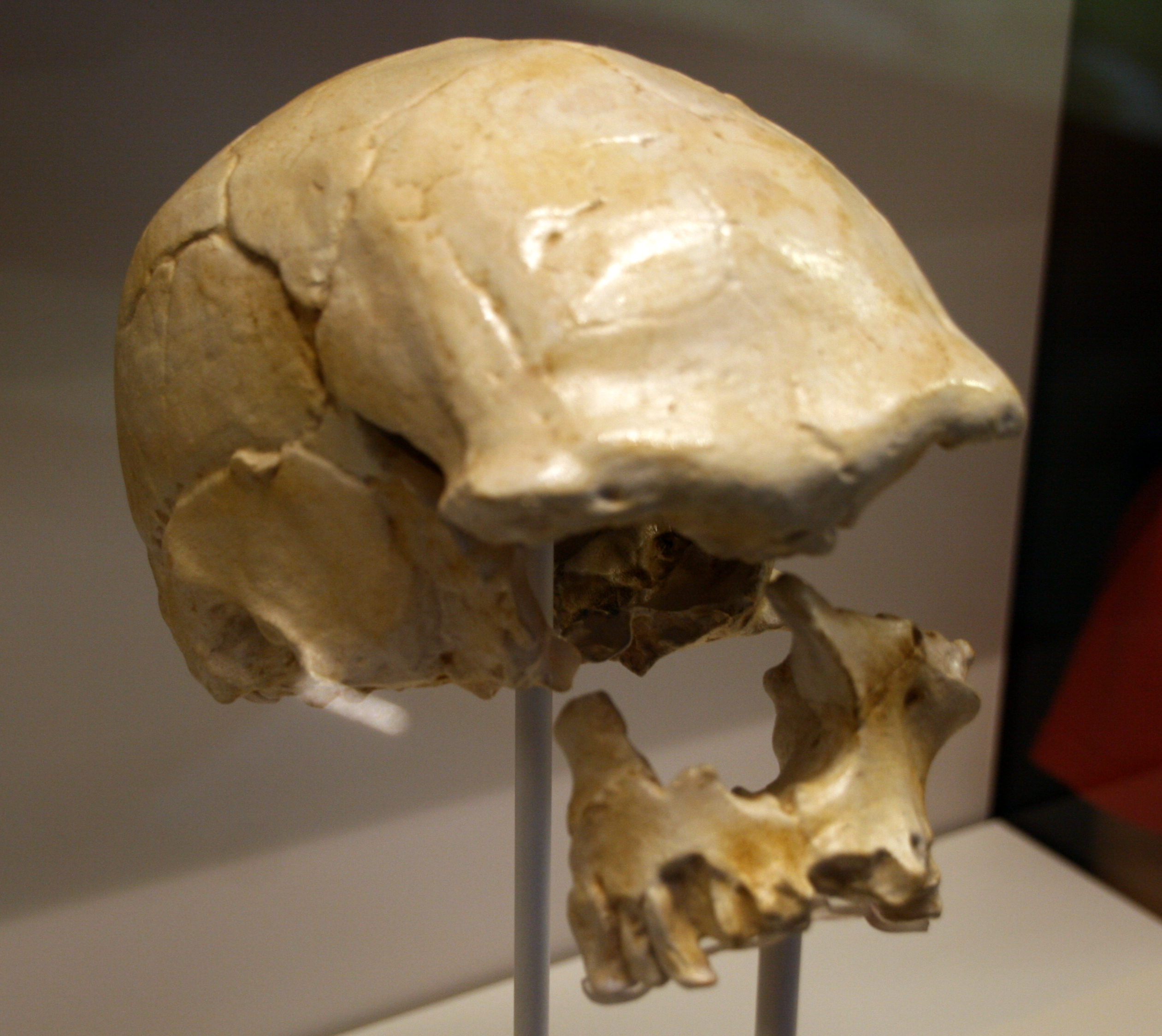 Cráneo de Ngaloba, Homo sapiens, LH 18. Réplica Original: Laetoli (Tanzania) 120.000 - 200.000 años Museo Nacional de Dar Es Salaam, Tanzania Réplica: Instituto de Evolución en África Exhibido en exposición temporal, "La cuna de la humanidad", en el Museo Arqueológico de Regional de Madrid